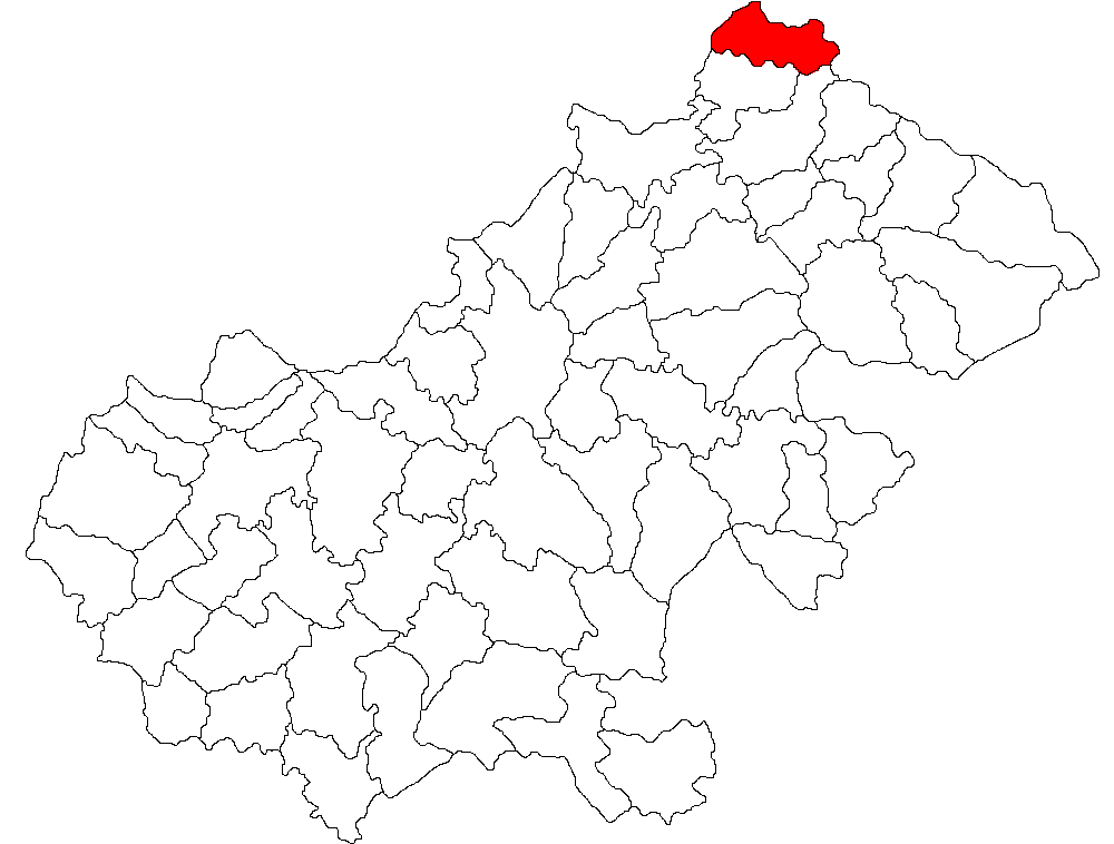 Categorie:Hărţi ale judeţului Satu Mare